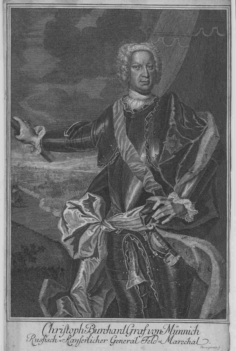 Burkhard Christoph von Münnich (1683-1767) — Graf, Feldmarschall, Minister; Rußland